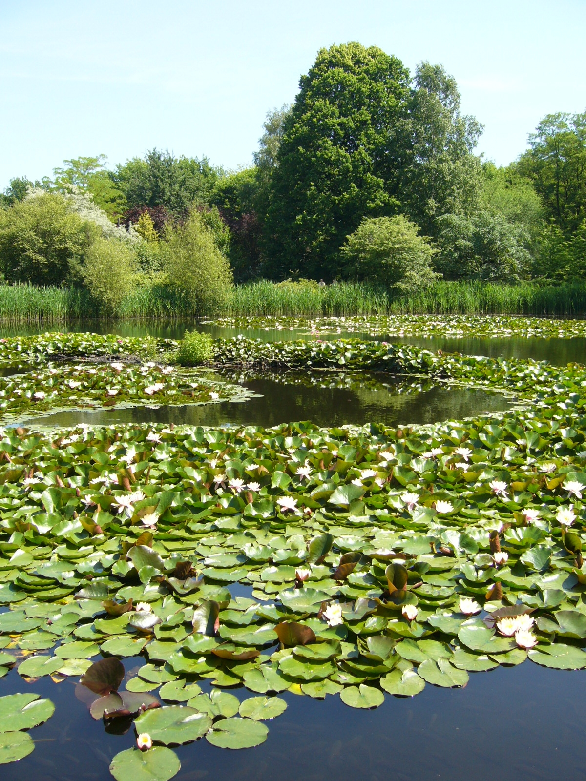 Łódzki Ogród Botaniczny latem. Staw z kwitnącymi nenufarami.